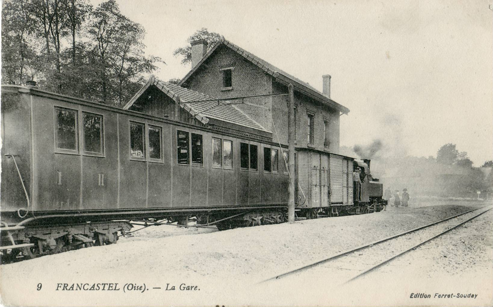 Carte postale ancienne éditée par Ferret-Souday, n°9FRANCASTEL - La GareGros plan d'un train de la ligne de chemin de fer secondaire à voie métrique Ligne Estrées-Saint-Denis - Froissy - Crèvecœur-le-Grand